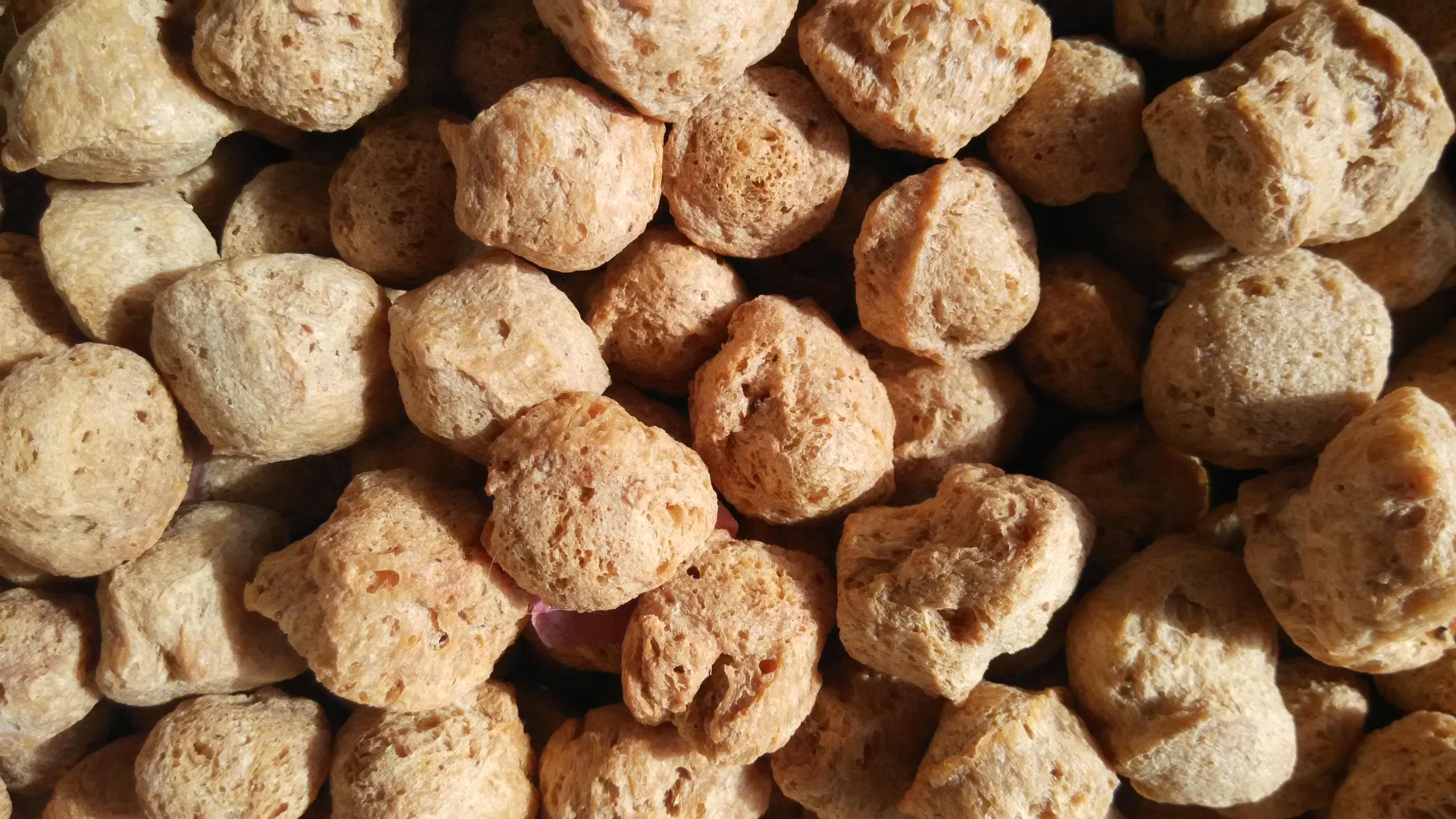 புலவு போன்ற உணவில் சேர்க்கப்பெறும் பொருள்